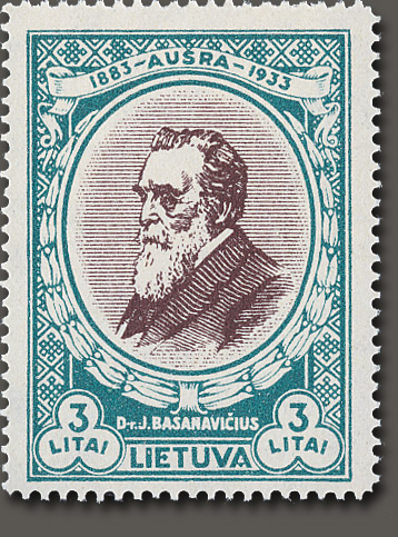 1933 May 6. "Lietuvos vaikas" (3rd issue). Jonas Basanavičius portrait. Michel cat. No. 363 (3 Litas).